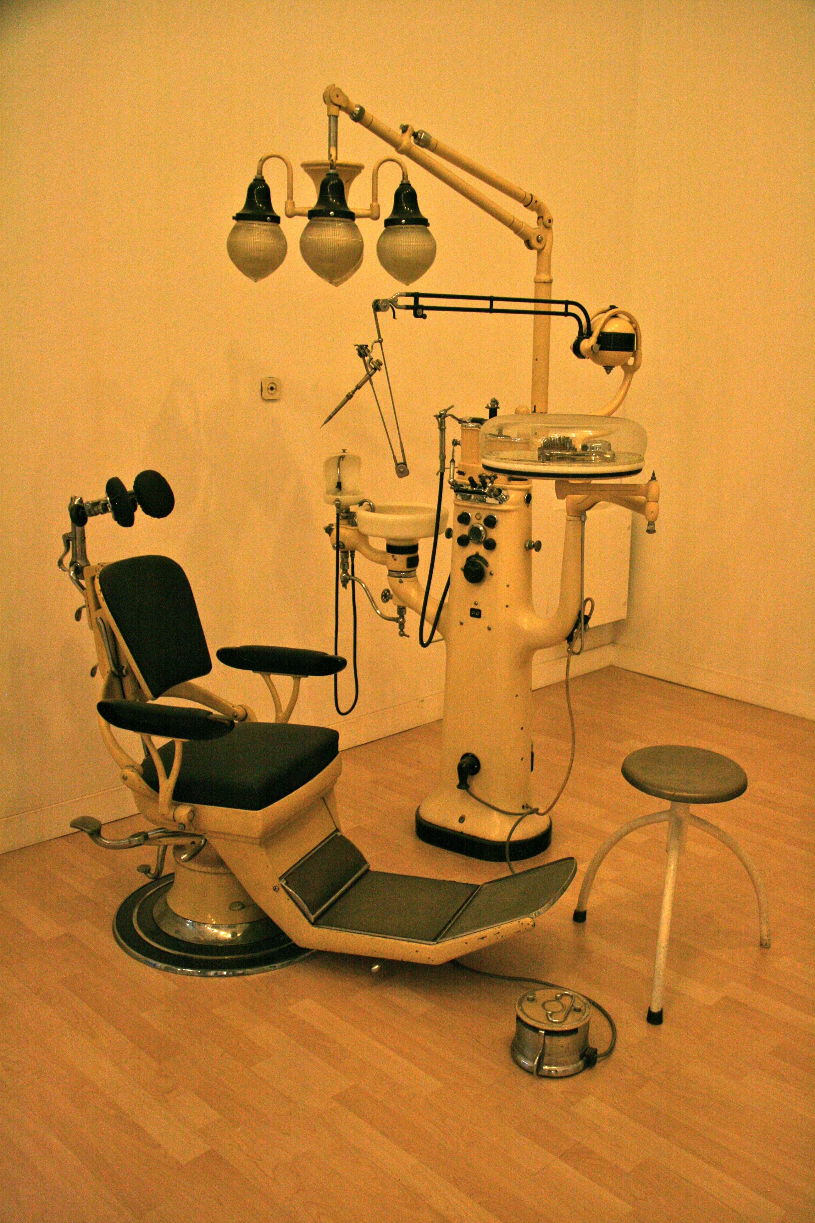 Silla de dentista en Museo de las Delicias en Madrid